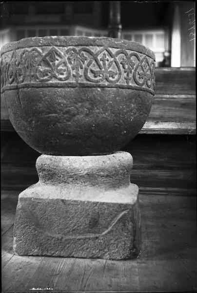 Dopfunt av sandsten, 1200-tal. Kategori: (04) DopfuntarDopfunt av sandsten, 1200-tal.